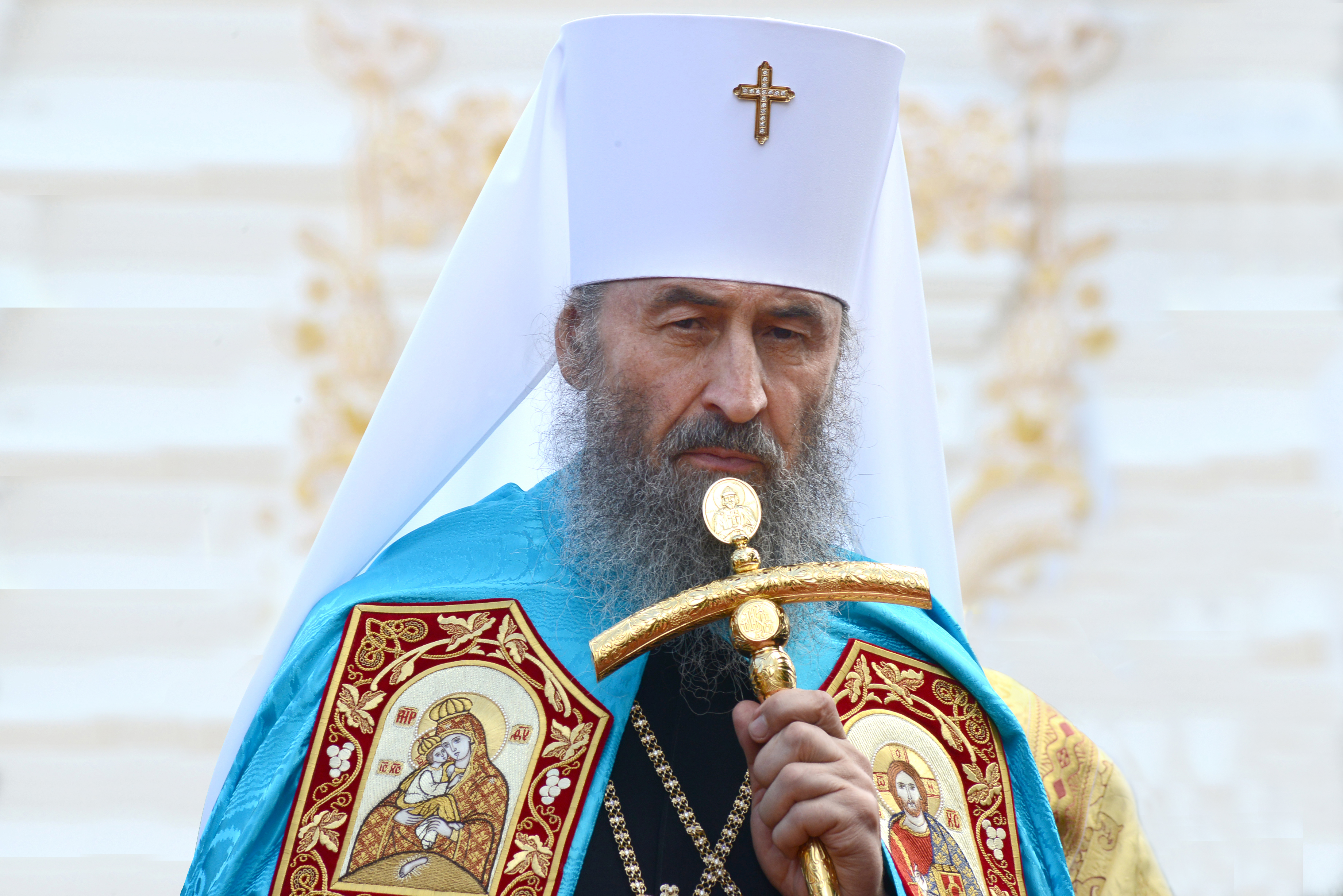 Onufriy (Berezovsky) 17 августа 2014 год, интронизация митрополита Онуфрия , в Киево-Печерской лавре.